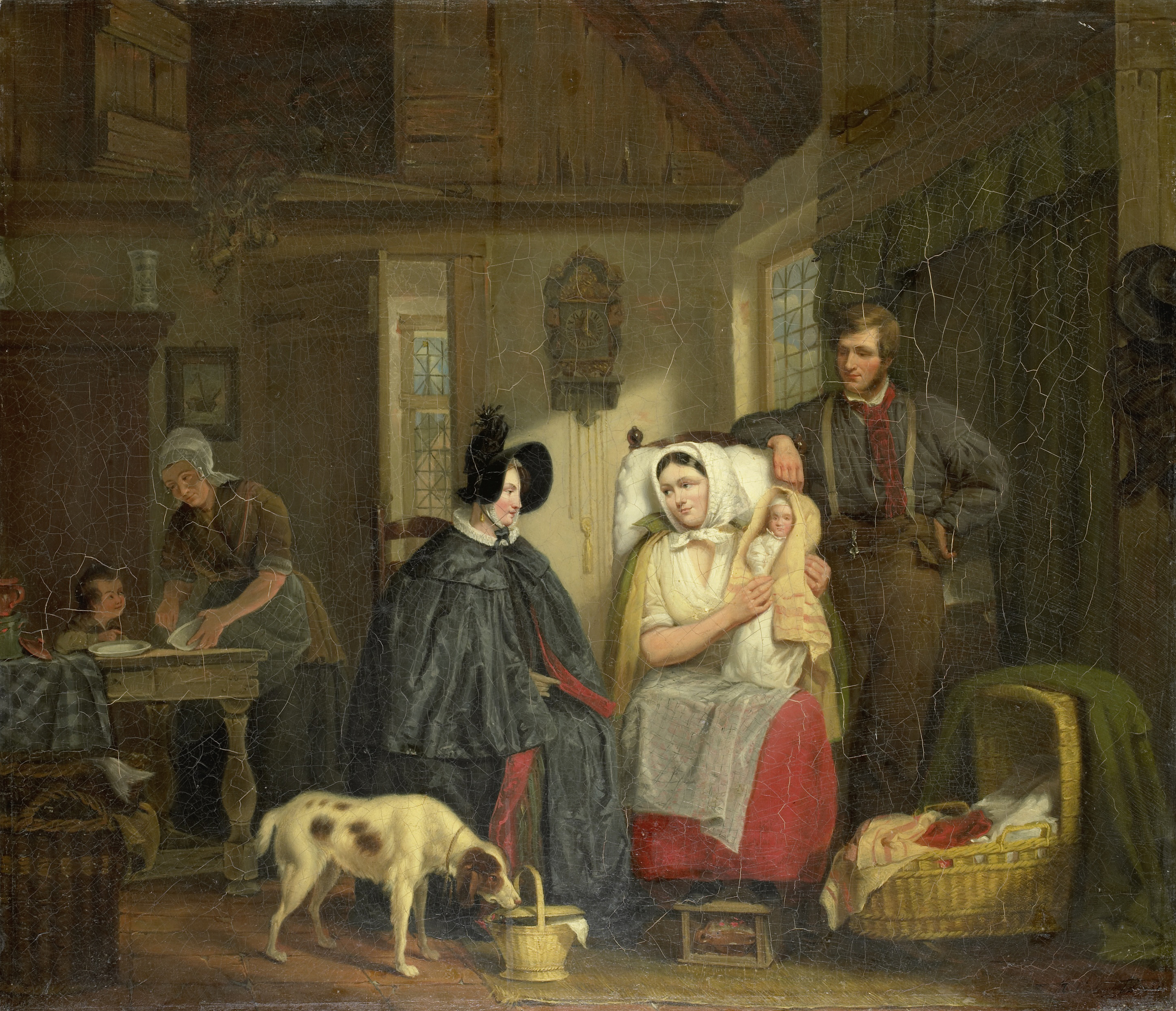 Interieur met een vrouw die een bezoek brengt aan een jonge moeder. De kraamvrouw zit in een stoel met het kind op de arm, naast de stoel staat de vader. Op de vloer een wieg, stoofje en een hond die snuffelt aan een mand. Linksachter bereidt een meid eten voor een kind. Aan de muur een stoelklok.